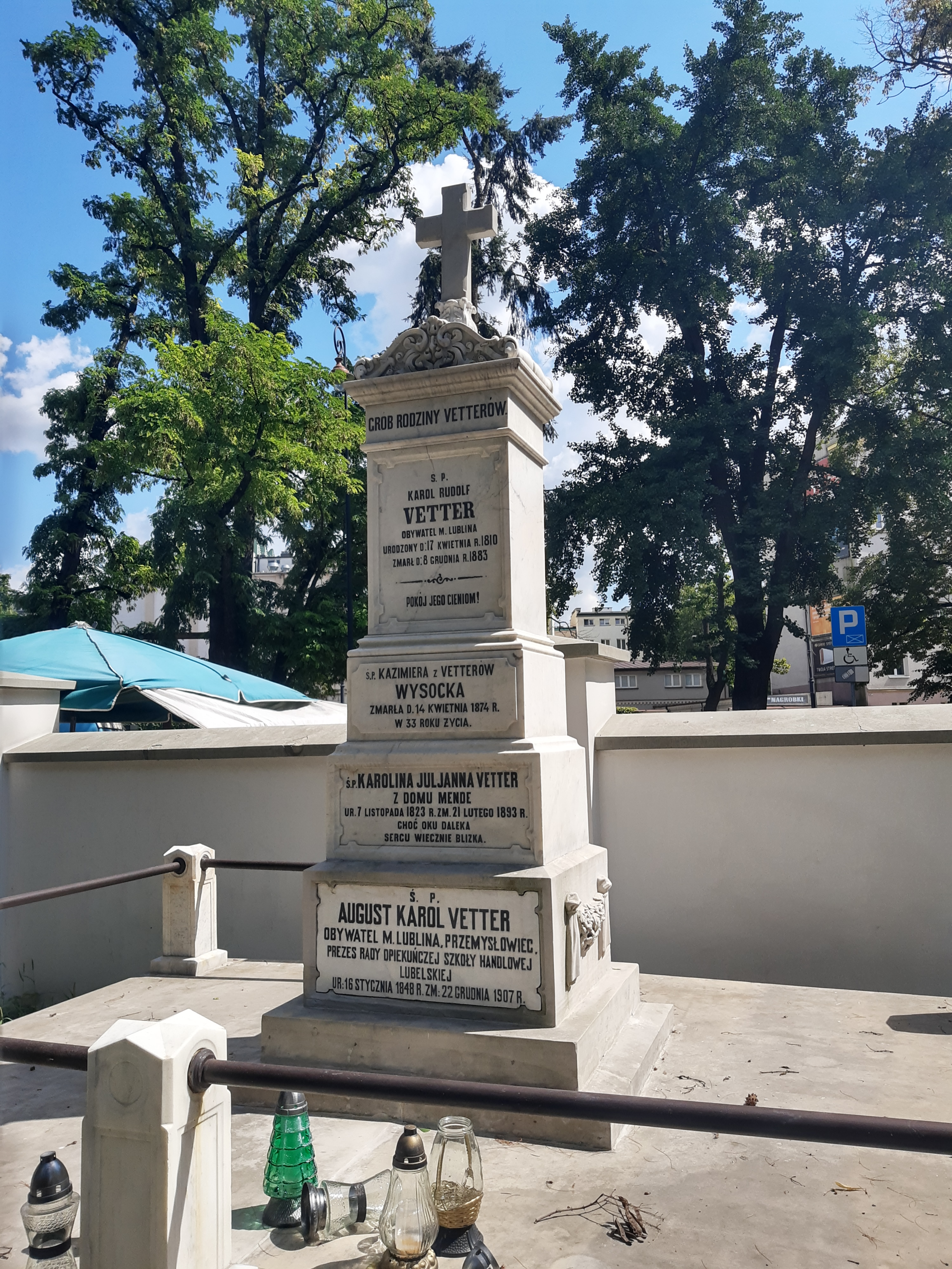 Grób Karola Rudolfa i Augusta Karola Vettera na cmentarzu przy Lipowej